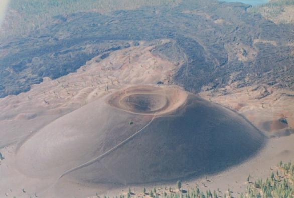 Cinder Cone Arial